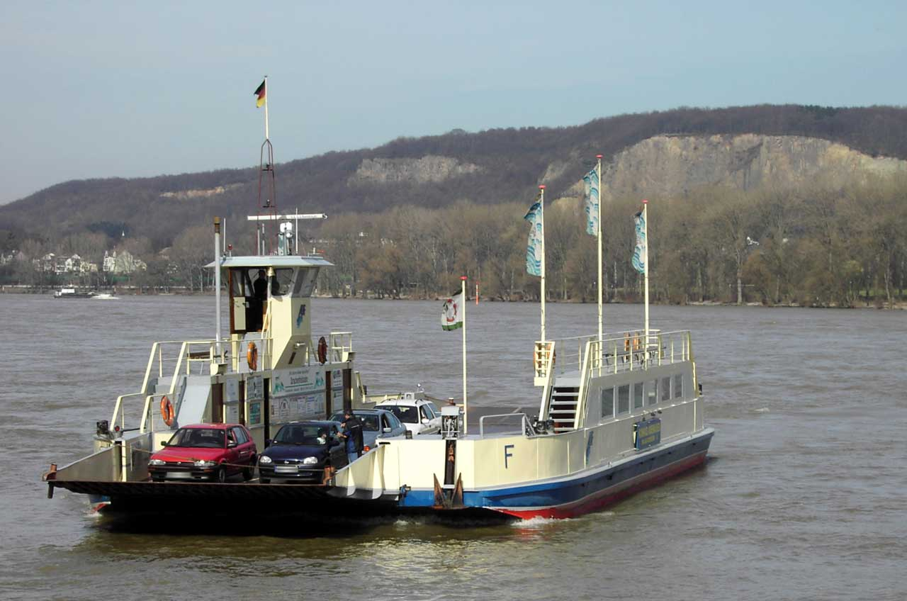 Rheinfähre Bad Godesberg–Niederdollendorf. Im Hintergrund rechts der Kuckstein und mittig die Rabenley in Oberkassel.